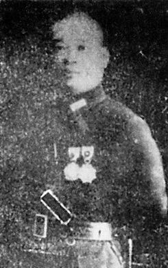 Lieutenant General Wu Huawen